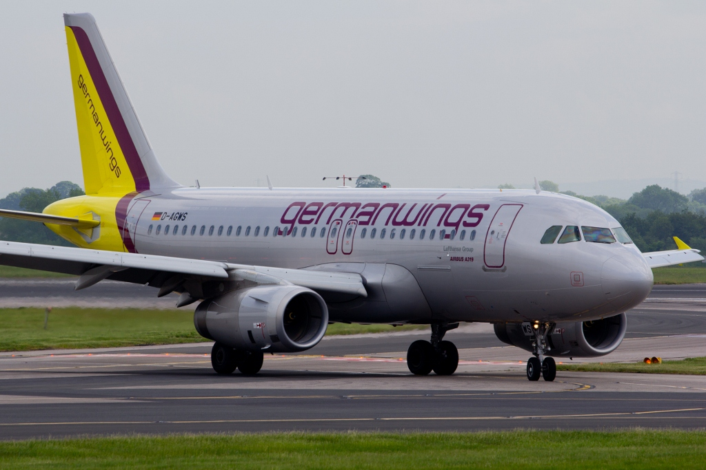 Manchester 1/6/12